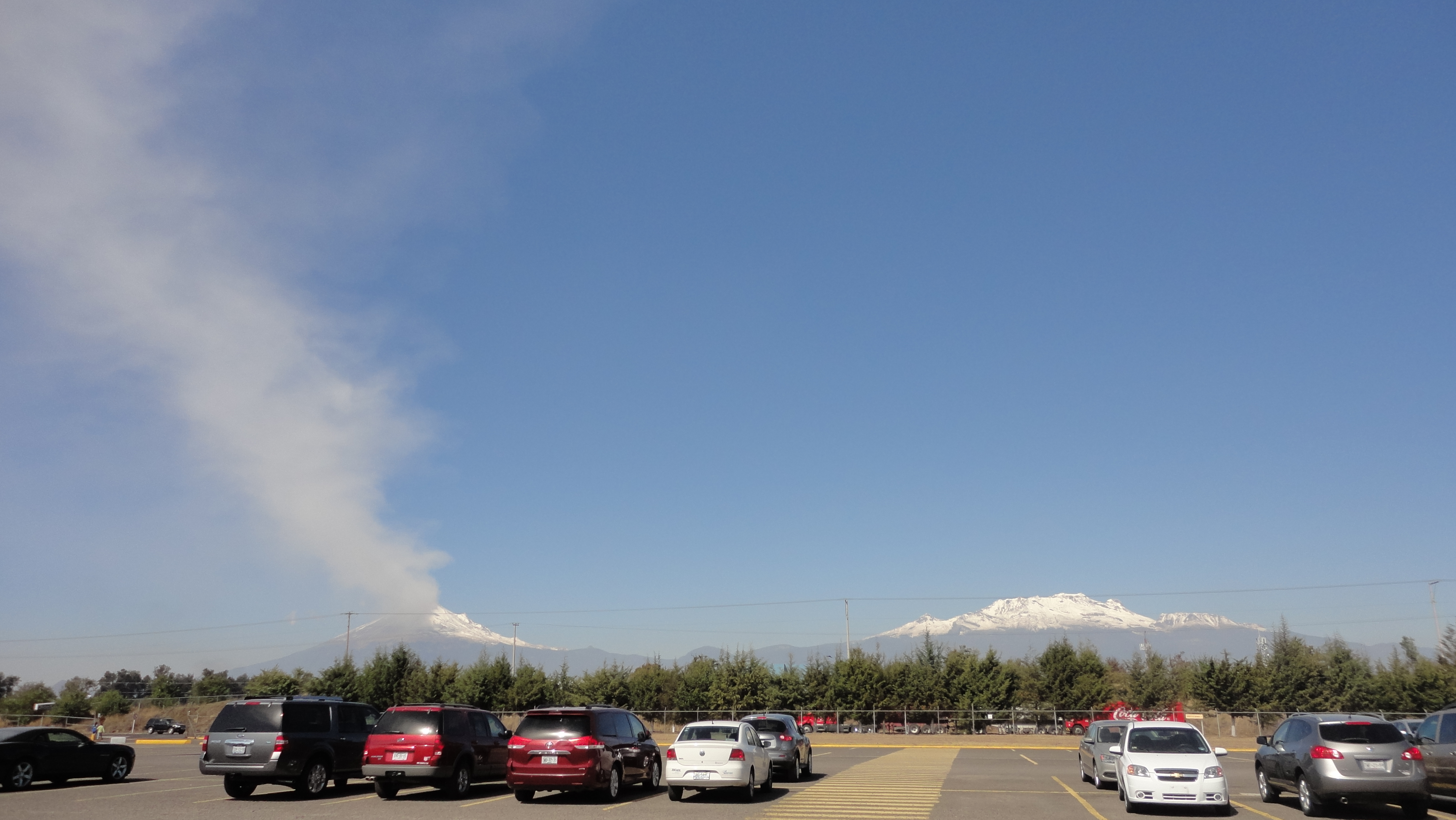 Vista exterior del estacionamiento saliendo de la terminal